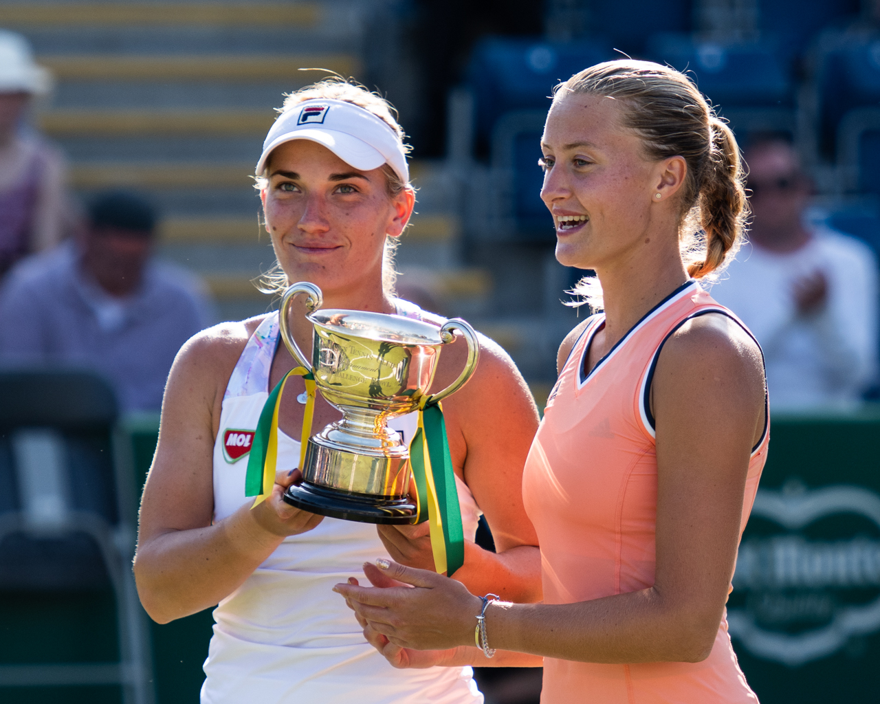 Timea Babos & Kiki Mladenovic